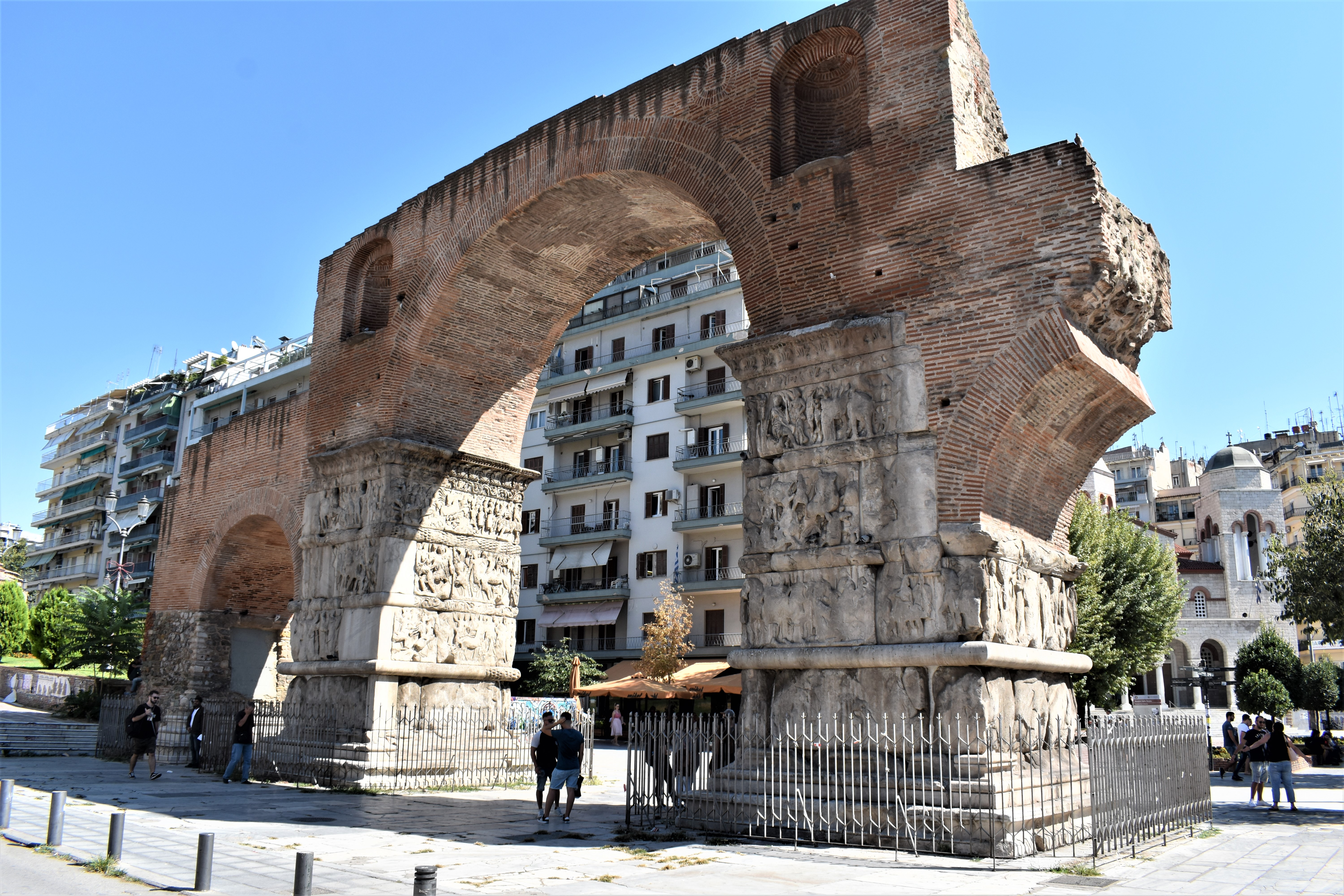 Αψίδα Γαλερίου«Αψίδα Γαλερίου»